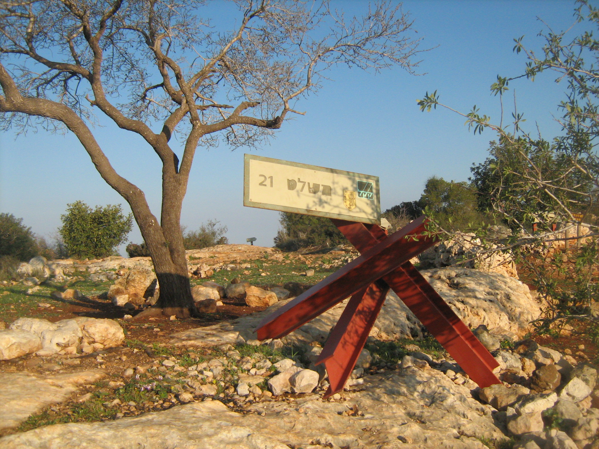 מישלט 21 - דרך בורמה